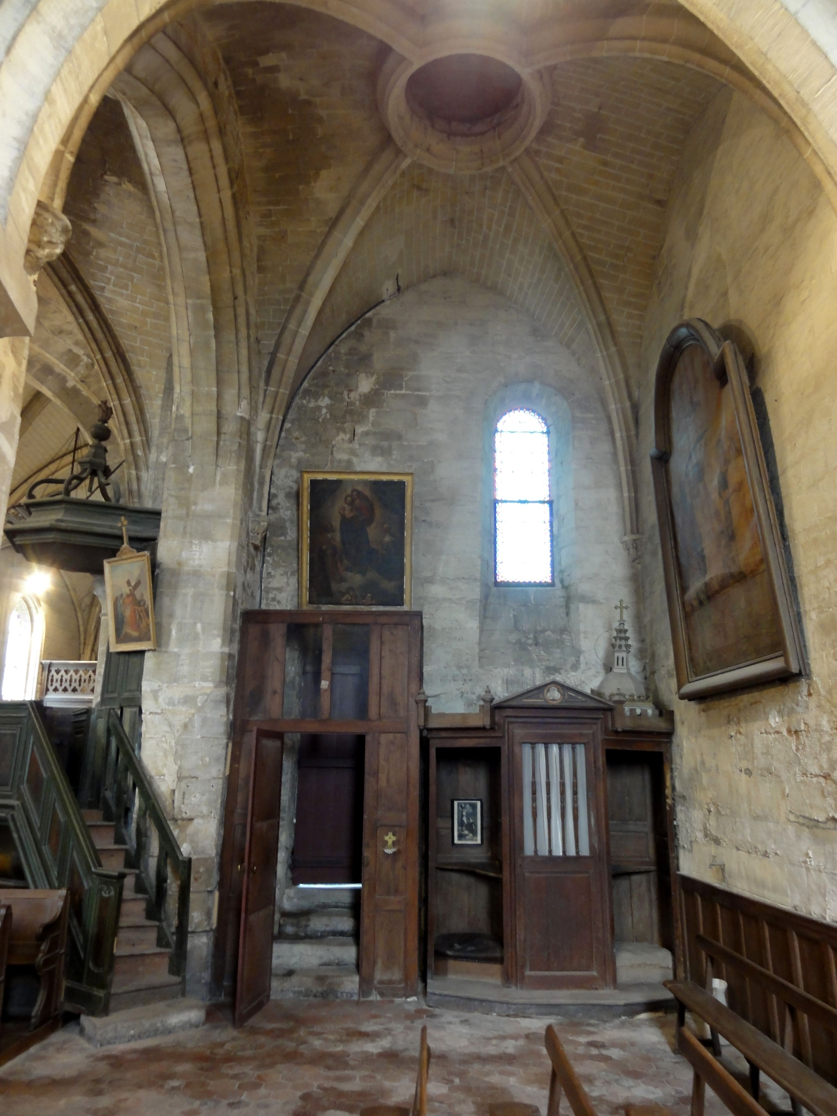 Base du clocher, vue vers l'ouest.